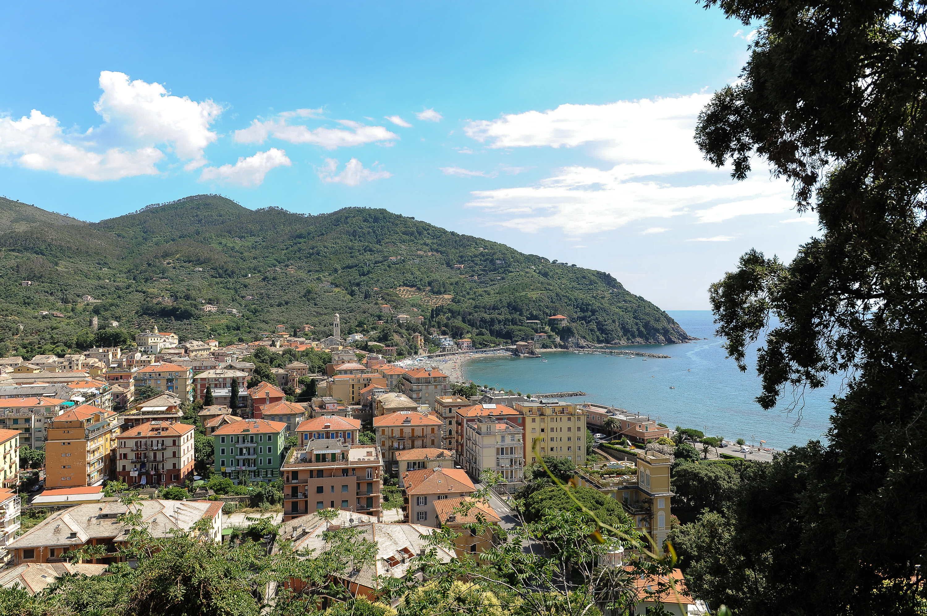 Levanto